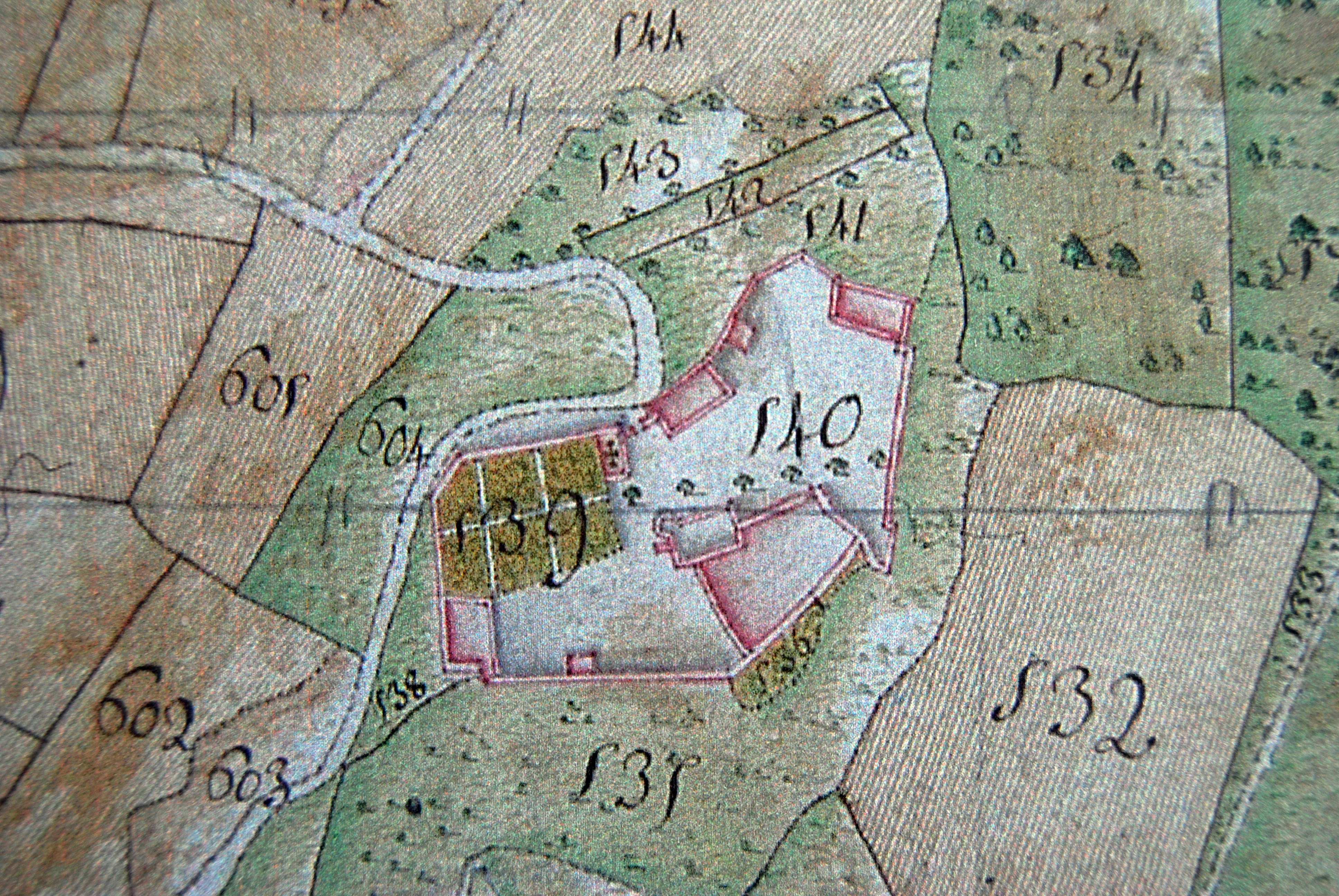 Plan château de L'Epine sur Mappe Sarde de 1730